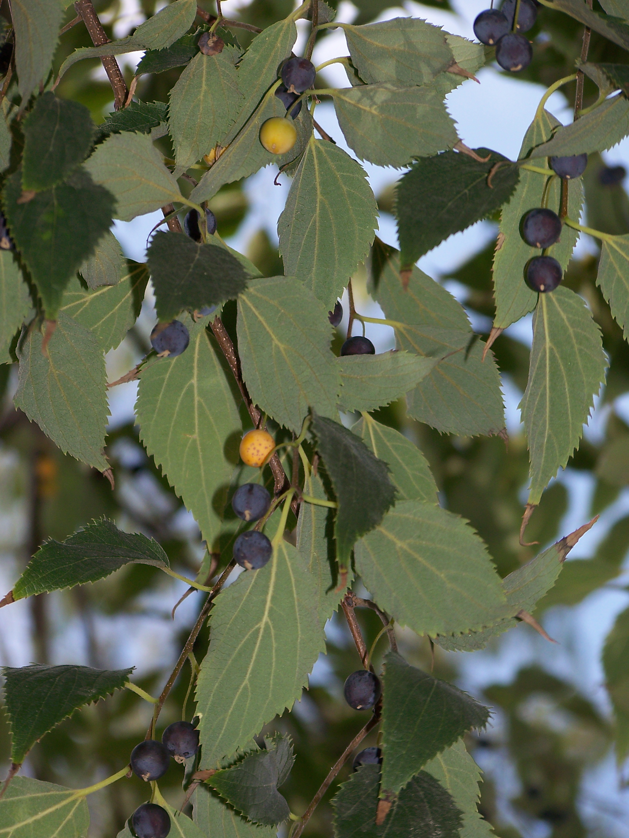 Celtis australis (Almez) : Frutos maduros con unos pocos inmaduros in situ - Parque del Oueste, Paseo de Ruperto Chapi, lado oueste (Madrid, España).